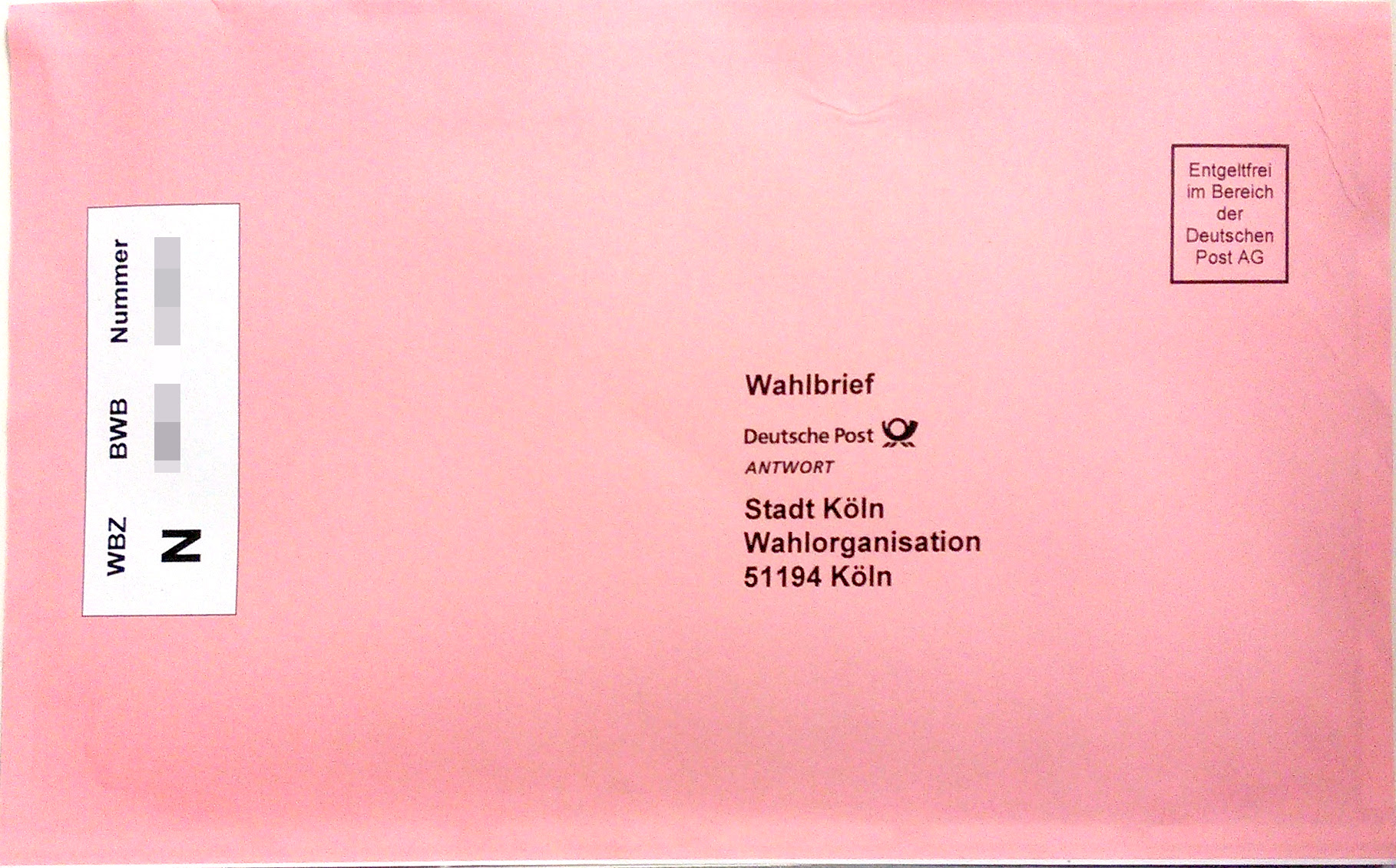 Wahlbrief zur Bürgermeisterwahl Köln 2015